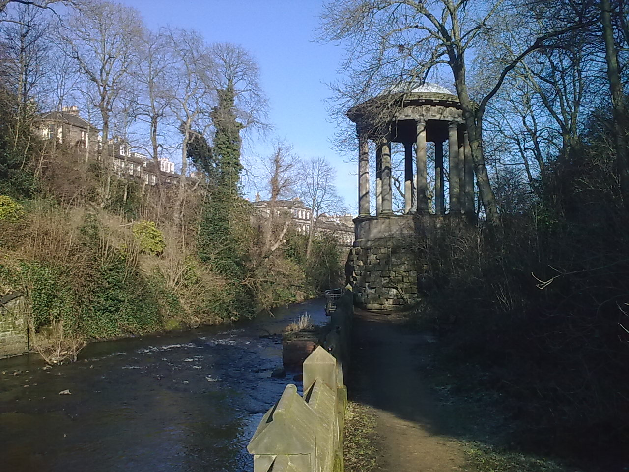 St Bernards Well